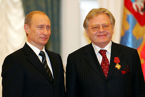 Юрий Антонов